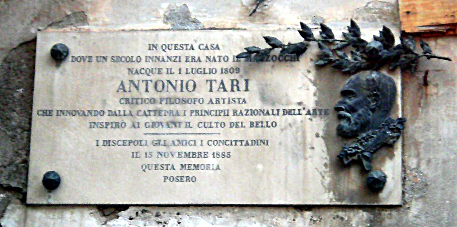 Lapide commemorativa di Antonio Tari, posta fuori il suo palazzo natìo a Santa Maria Capua Vetere.